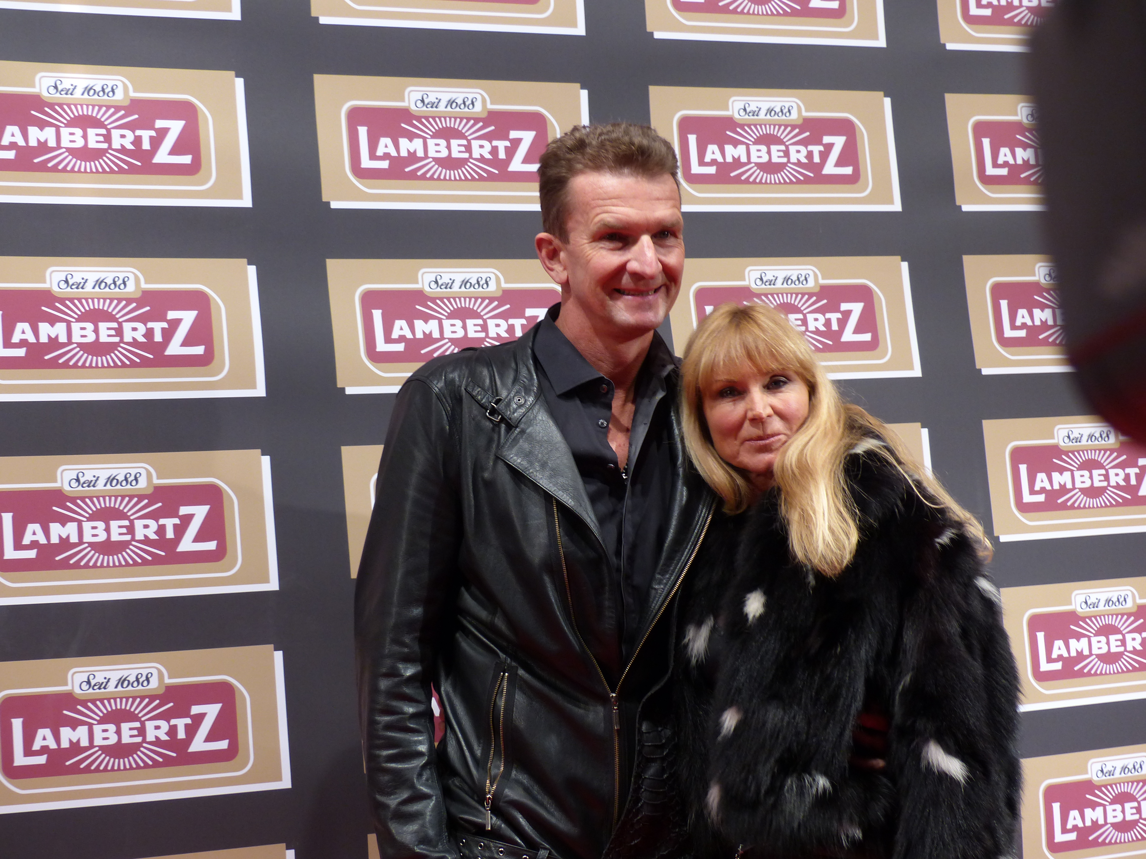 Michael Groß mit Ehefrau Ilona bei der Lambertz Monday Night, im Februar 2016.